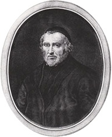 Godefridus Henschenius Jesuit, Bollandist